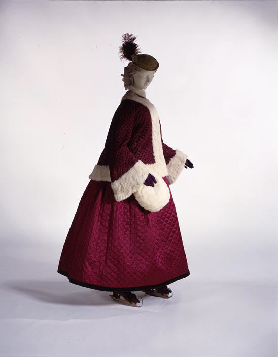 British; Skating ensemble